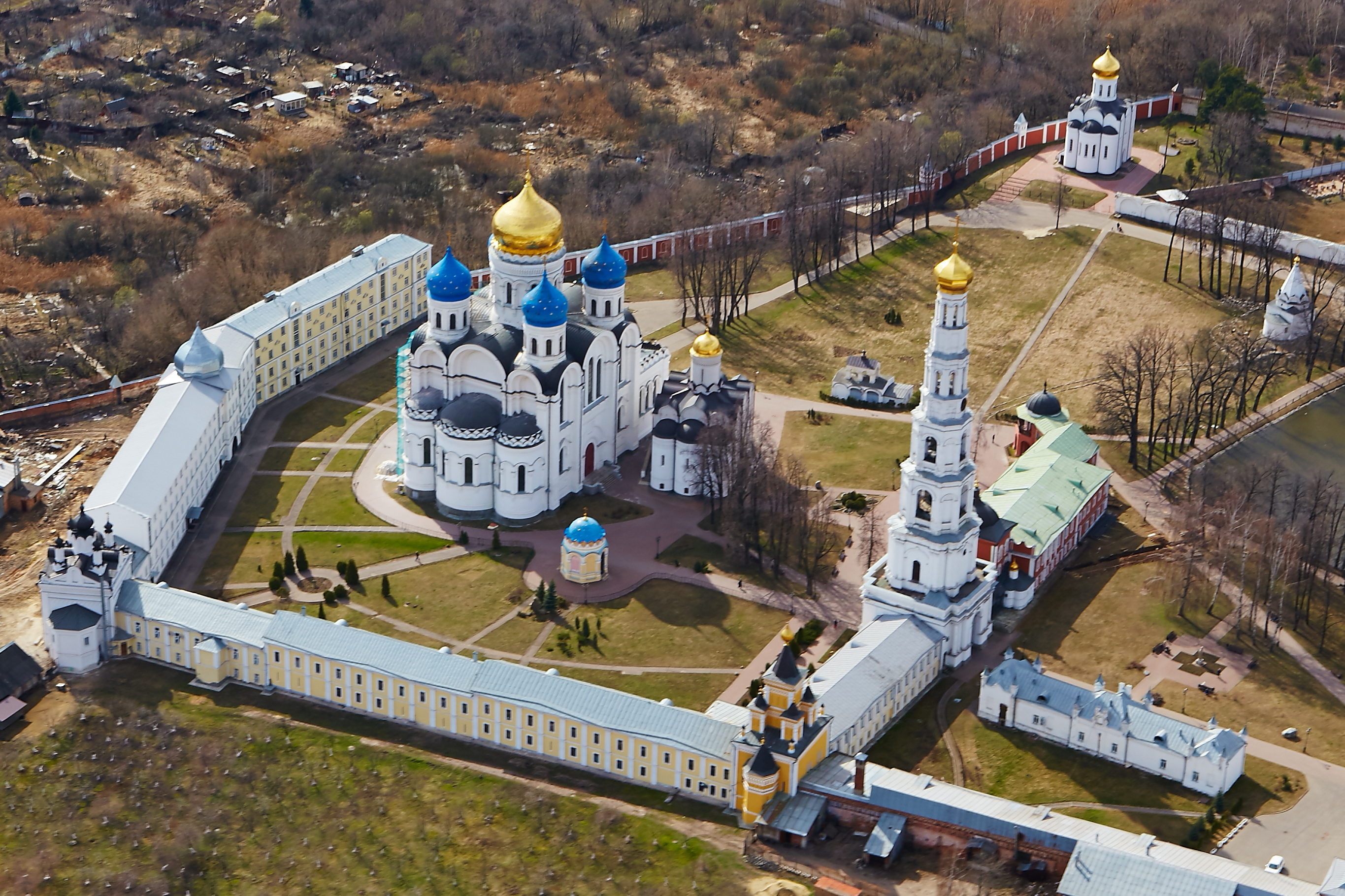 Николо-Угрешский монастырь (Москва и Московская область, Дзержинский, площадь Святителя Николая, 1)